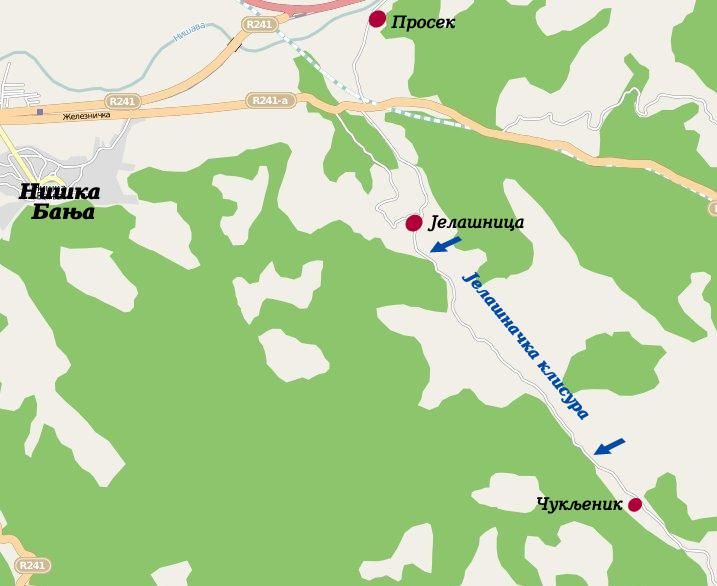 Mapa Jelašničke klisure.